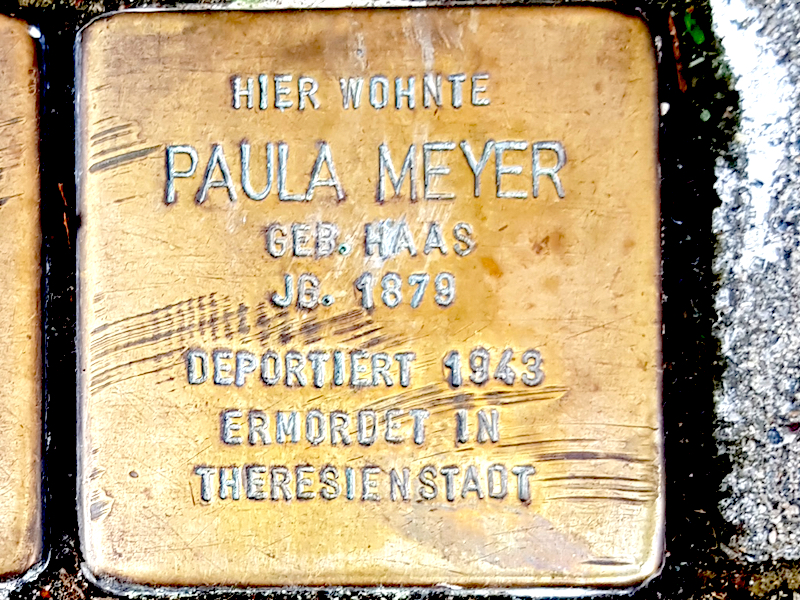 Stolperstein für Paula Meyer, geb. Haas, Jg. 1879, deportiert 1943, ermordet im KZ Theresienstadt